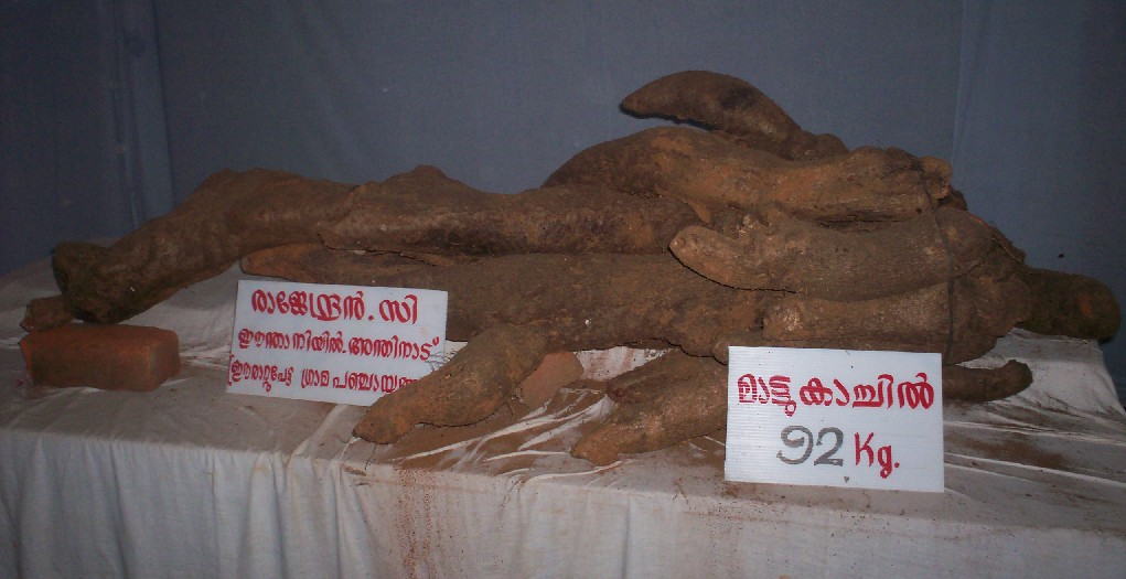 92 കിലോ തൂക്കമുള്ള കാച്ചിൽ പ്രദർശനത്തിന് വെച്ചിരിക്കുന്നു.